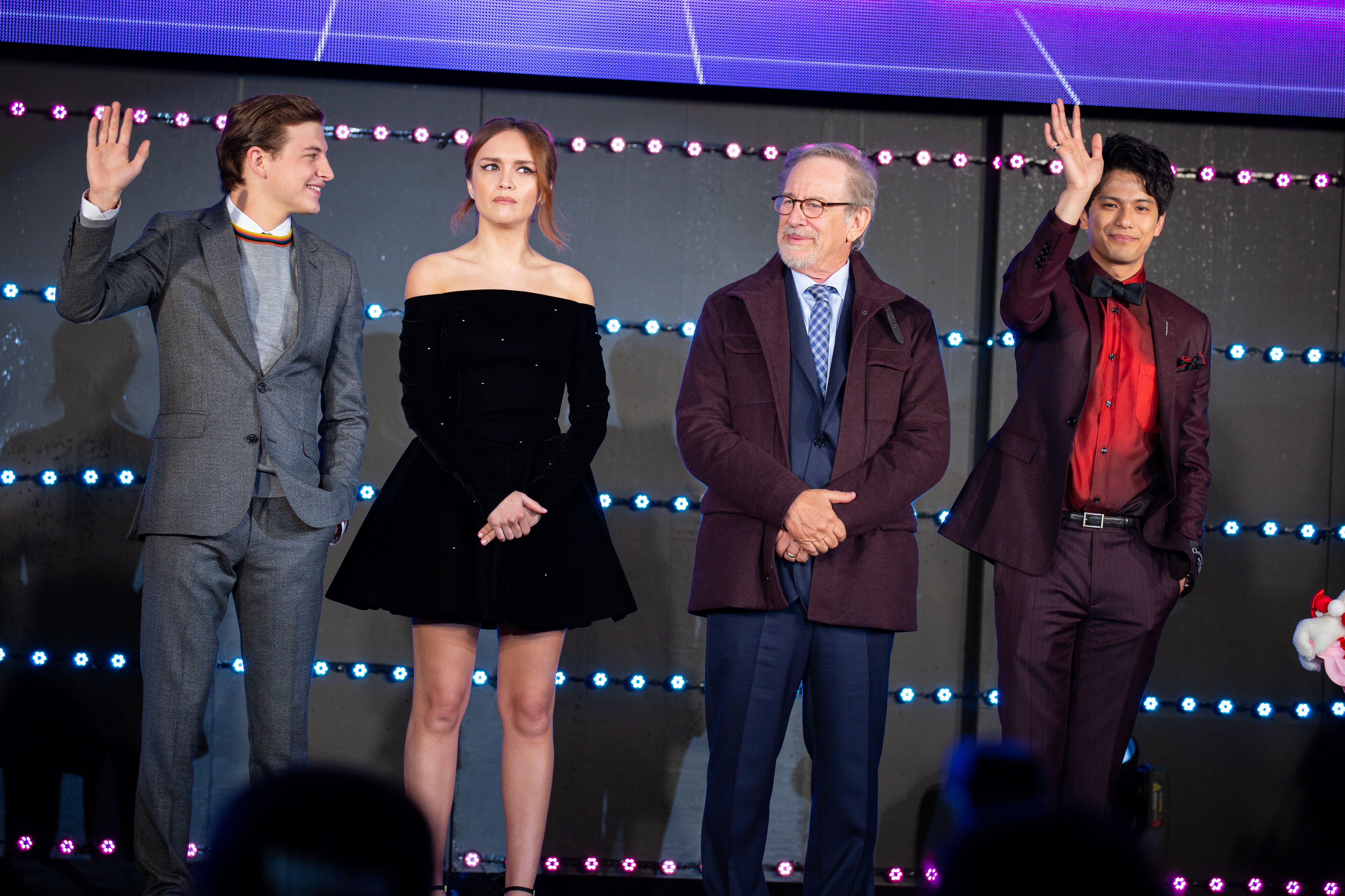 レディ・プレイヤー1 ジャパン・プレミア レッドカーペット タイ・シェリダン オリヴィア・クック スティーヴン・スピルバーグ 森崎ウィン